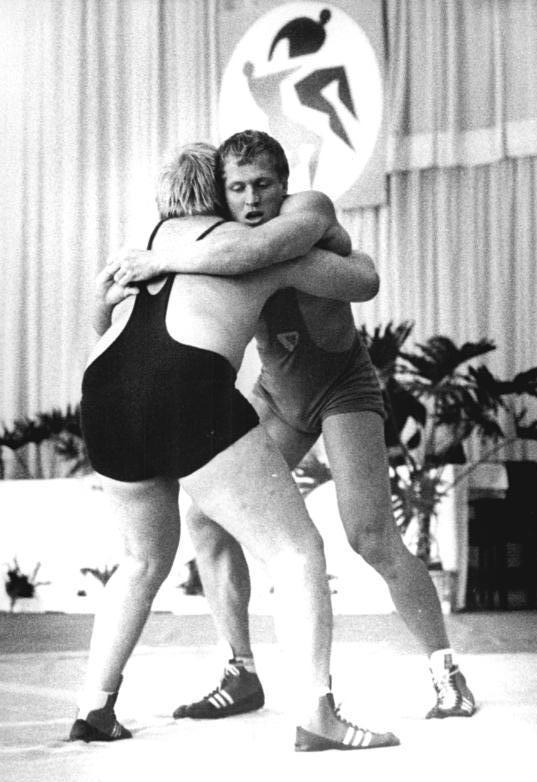 Andreas Schröder, Matthias Hiepe ADN-ZB Müller 25.6.83-pra Frankfurt-Oder: DDR-Meisterschaften im Klassischen Ringkampf In der Gewichtsklasse über 100 kg war Andreas Schröder (r.) vom SCM Jena erfolgreich, hier im Kampf gegen Matthias Hiepe (SCM Jena).